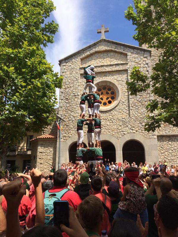 El primer 3d7 descarregat dels Encantats de Begues